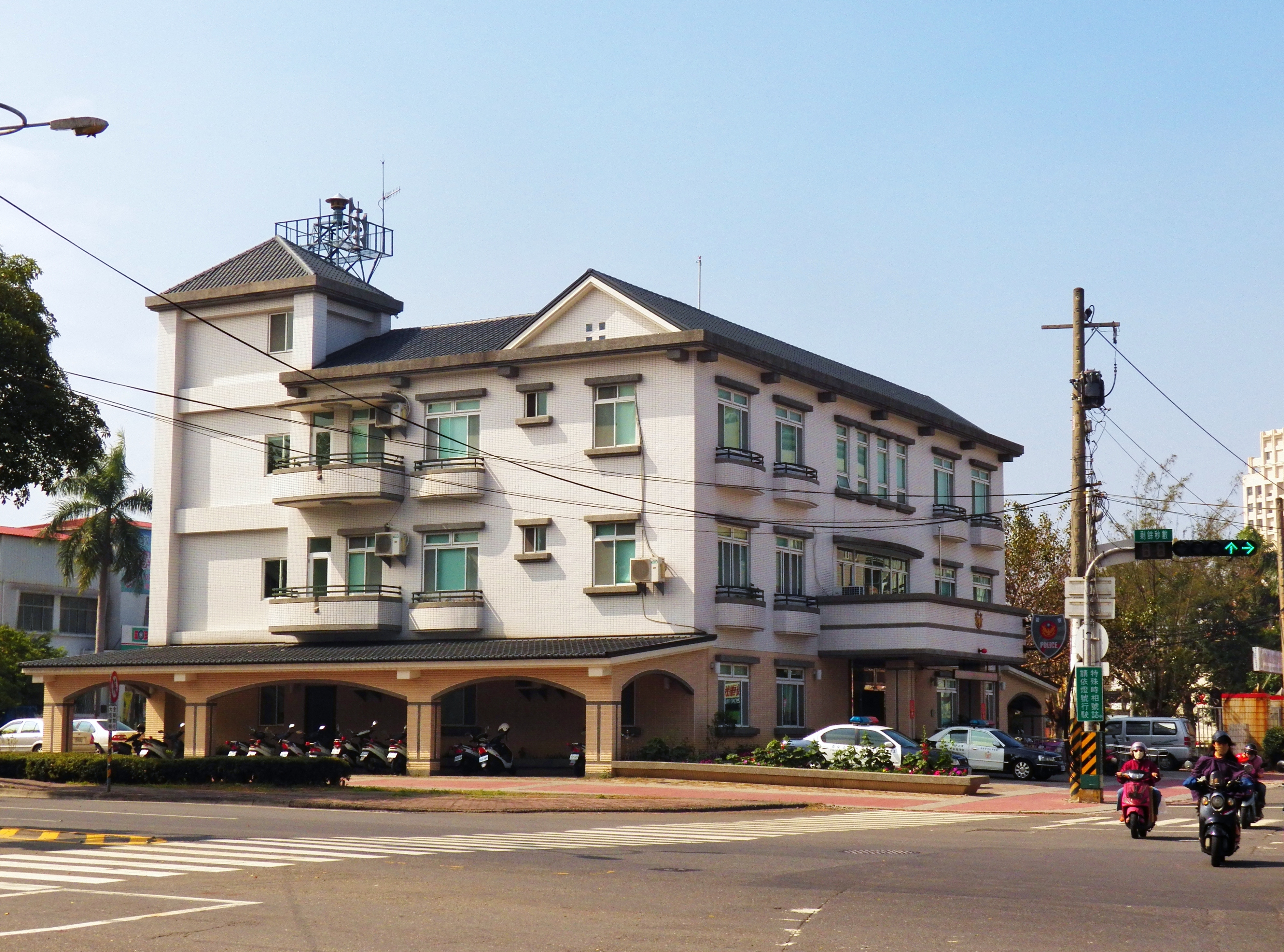 中文（台灣）: 位於陸軍軍官學校正門附近的高雄市政府警察局鳳山分局成功派出所，攝於中山東路與維武路路口，地址：高雄市鳳山區誠正里中山東路16號。